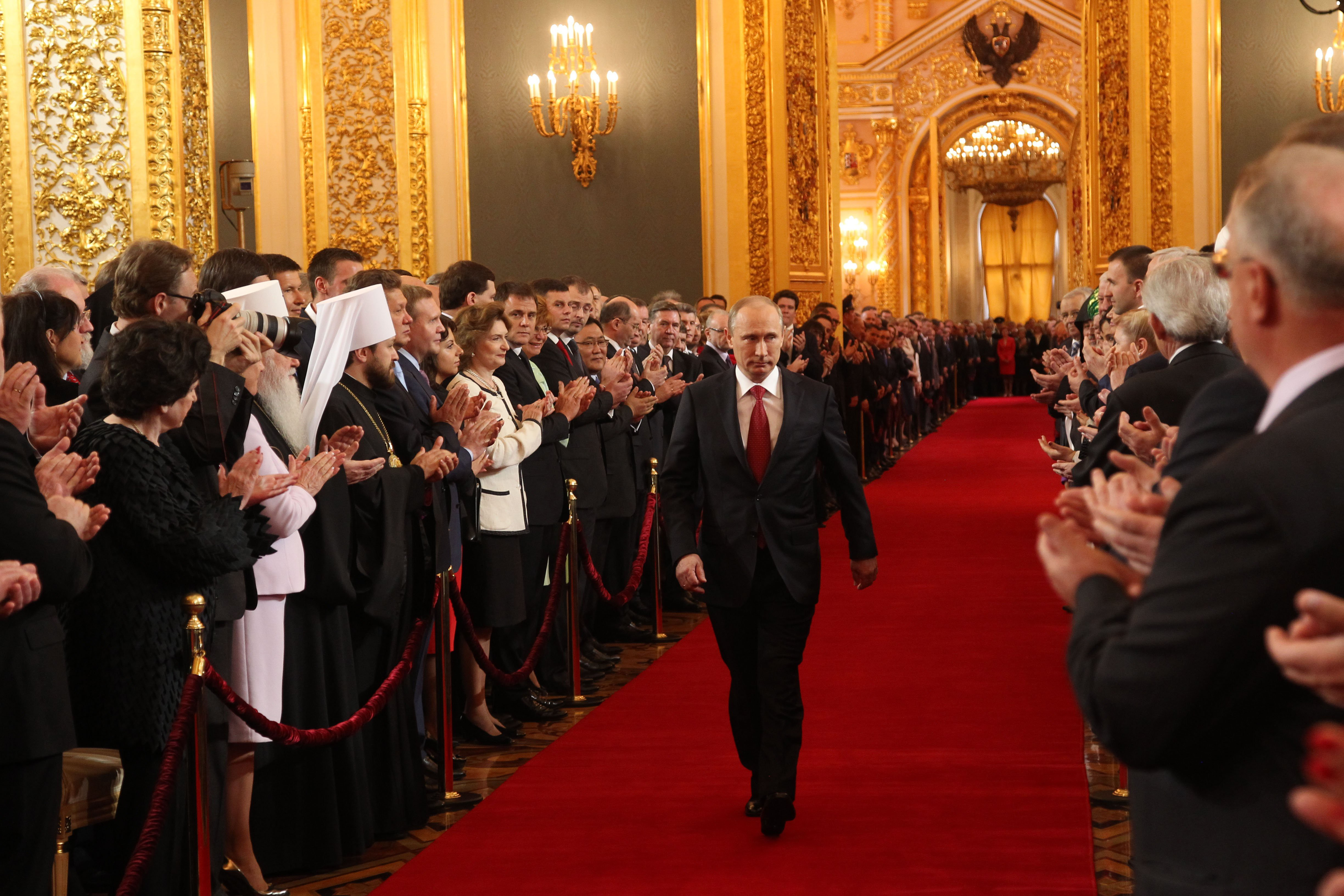 La ceremonia de inauguración de Vladímir Putin como Presidente de Rusia.